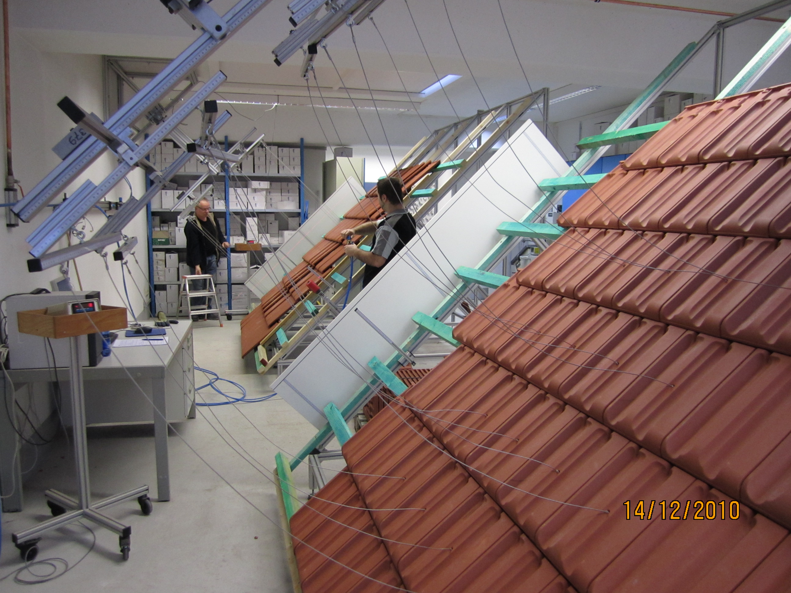 Prüfanlage FOS